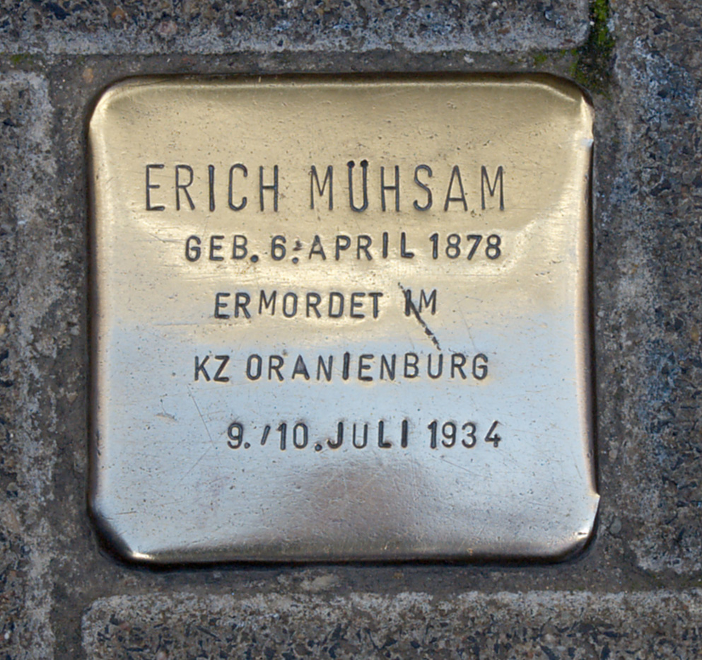 Stolperstein in Lübeck: Erich Mühsam (1878)